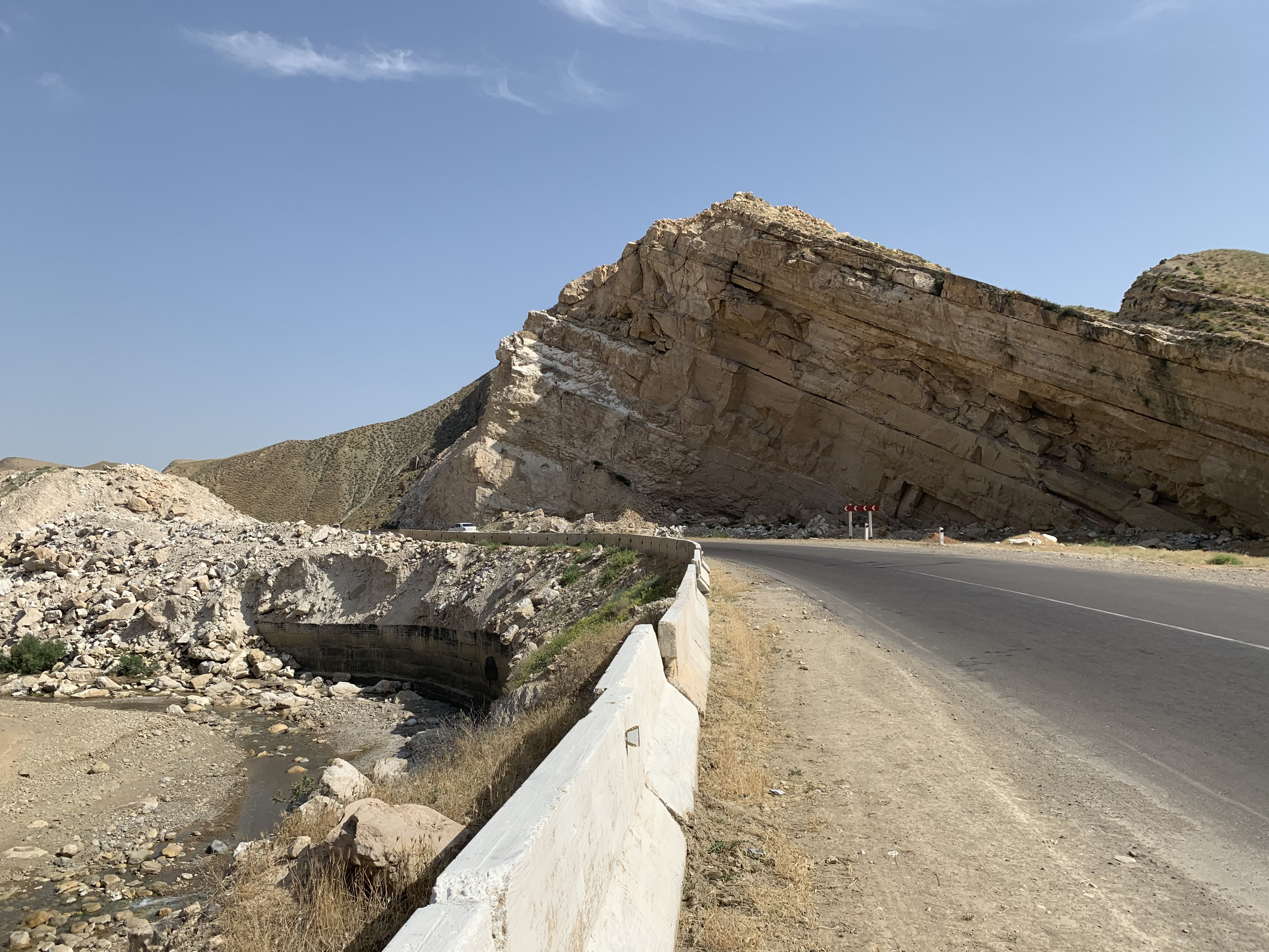 Река Аккапчигай прорезает Келиф-Шерабадскую гряду. По её каньону проложена автодорога Р-105